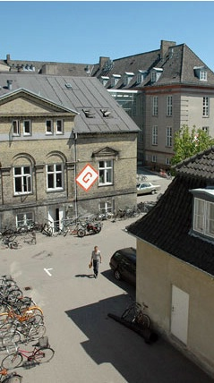 Danmarks Designskole